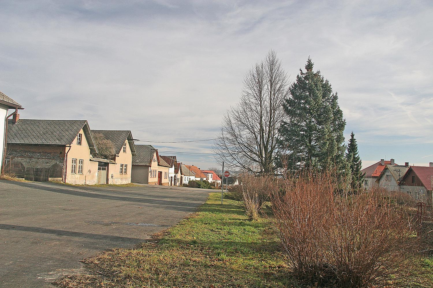 Náves v obci Uhelná Příbram, district Havlíčkův Brod autor: Prazak date: 15. 12. 2006